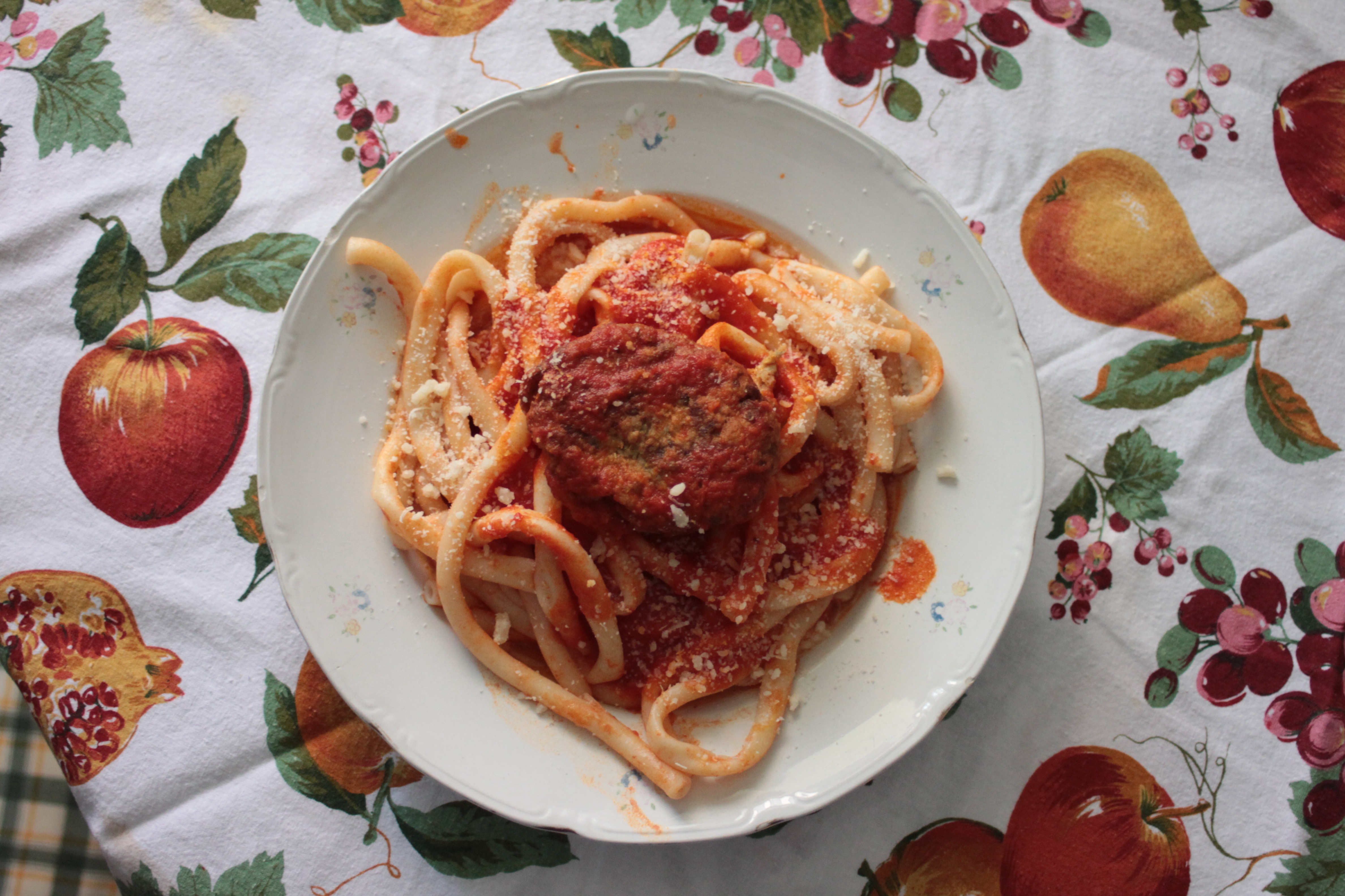 Pasta di casa con melanzane in Calabria